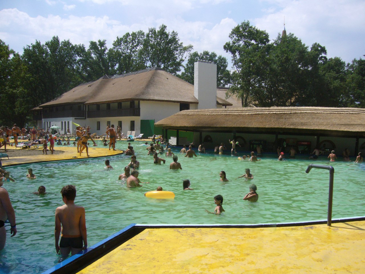 косино